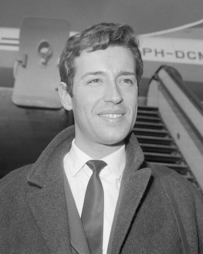 Aankomst Antonio Calvario (Portugese zanger) op Schiphol.